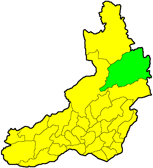 Тунгиро-Олёкминский район на карте Забайкальского края